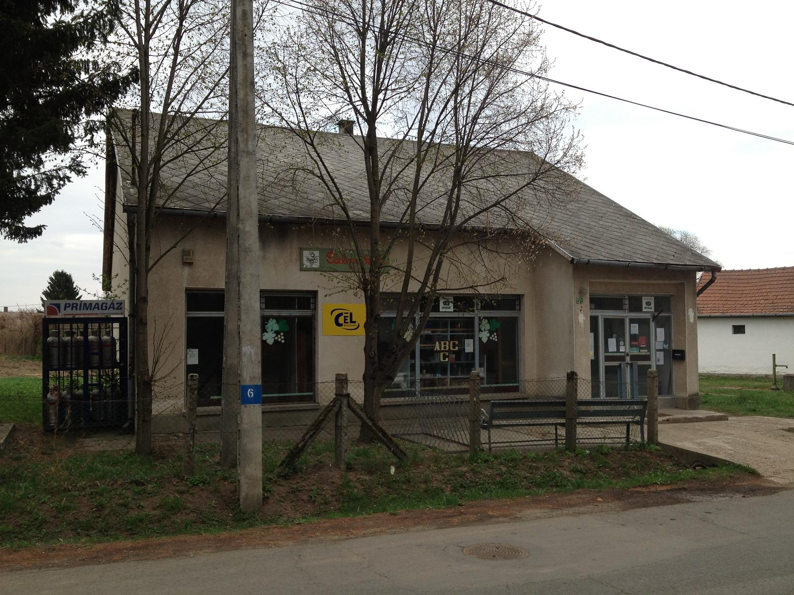 der Dorfladen in Tiszatardos in Ungarn